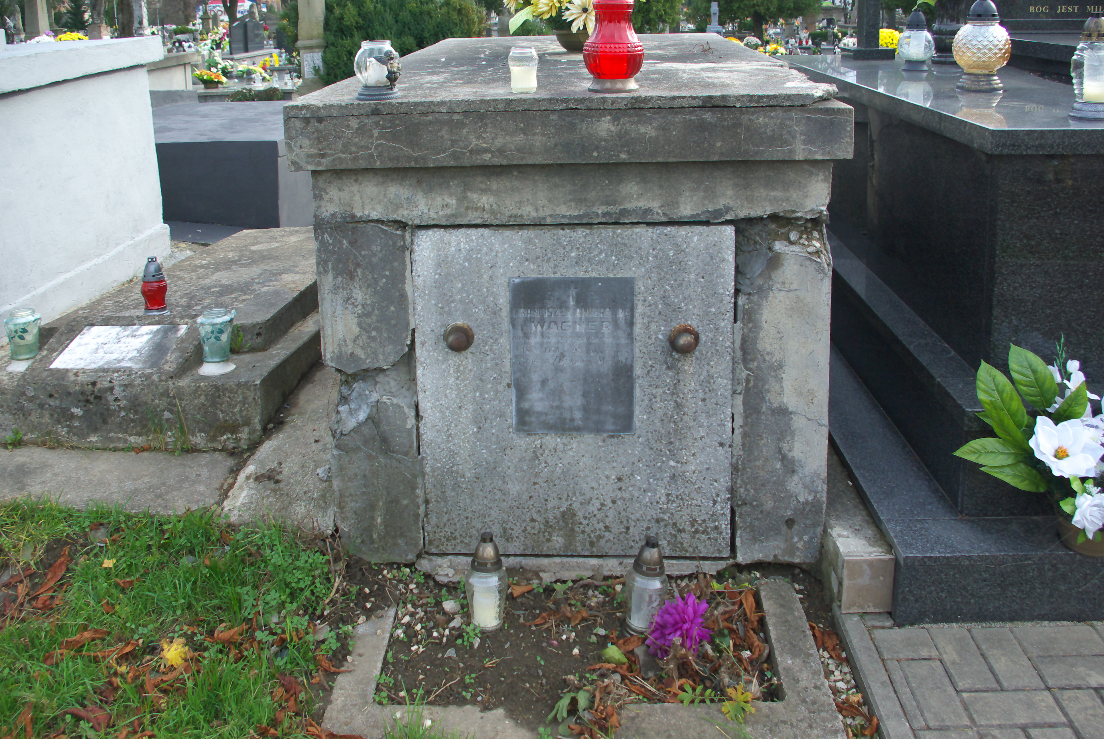 Nagrobek Franciszka Ankerburg Wagnera na Cmentarzu Centralnym w Sanoku (2019).